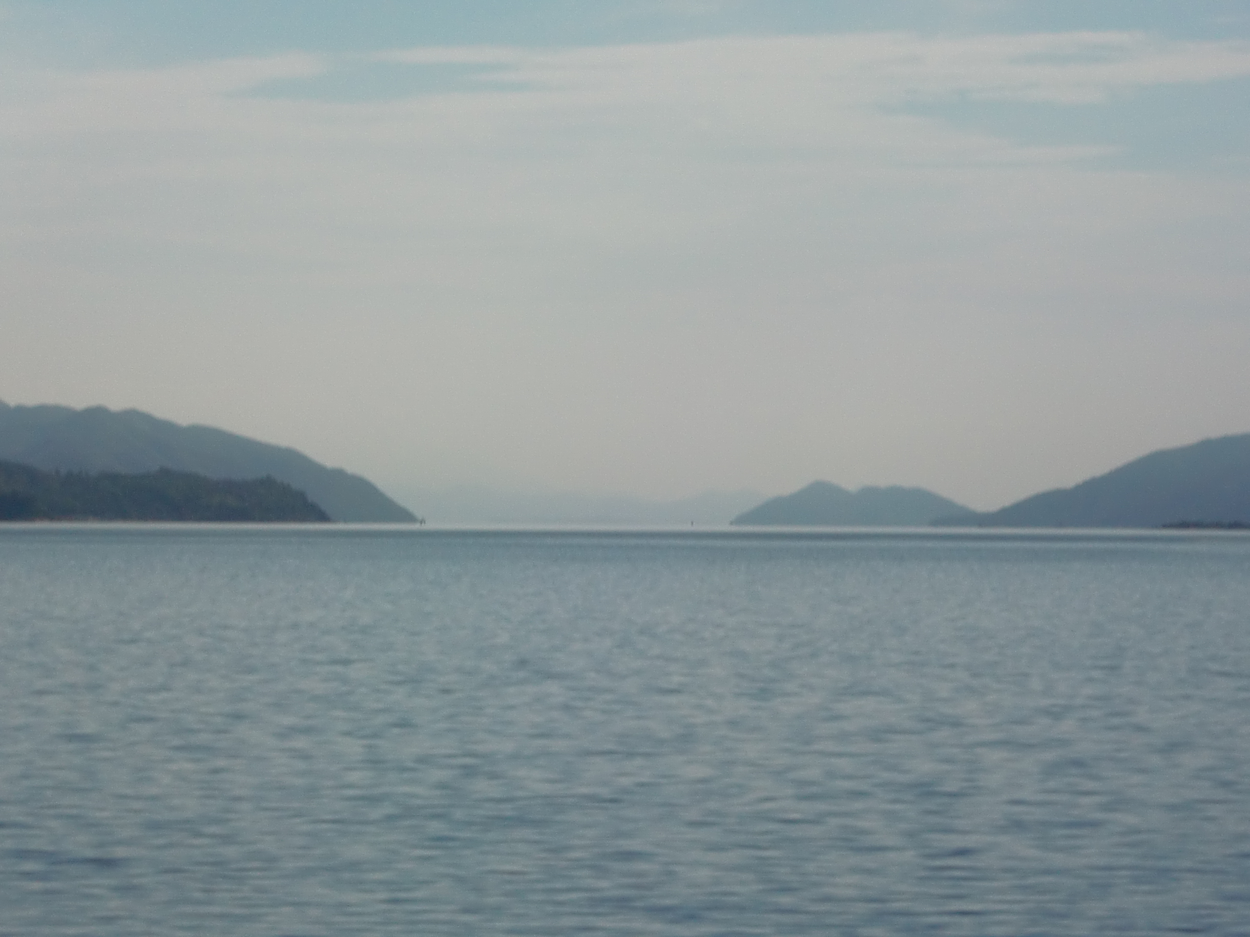 粵語: 由香港科學園側邊，白石角海濱長廊望出去，近係大埔海，遠係赤門，再遠係大赤門。